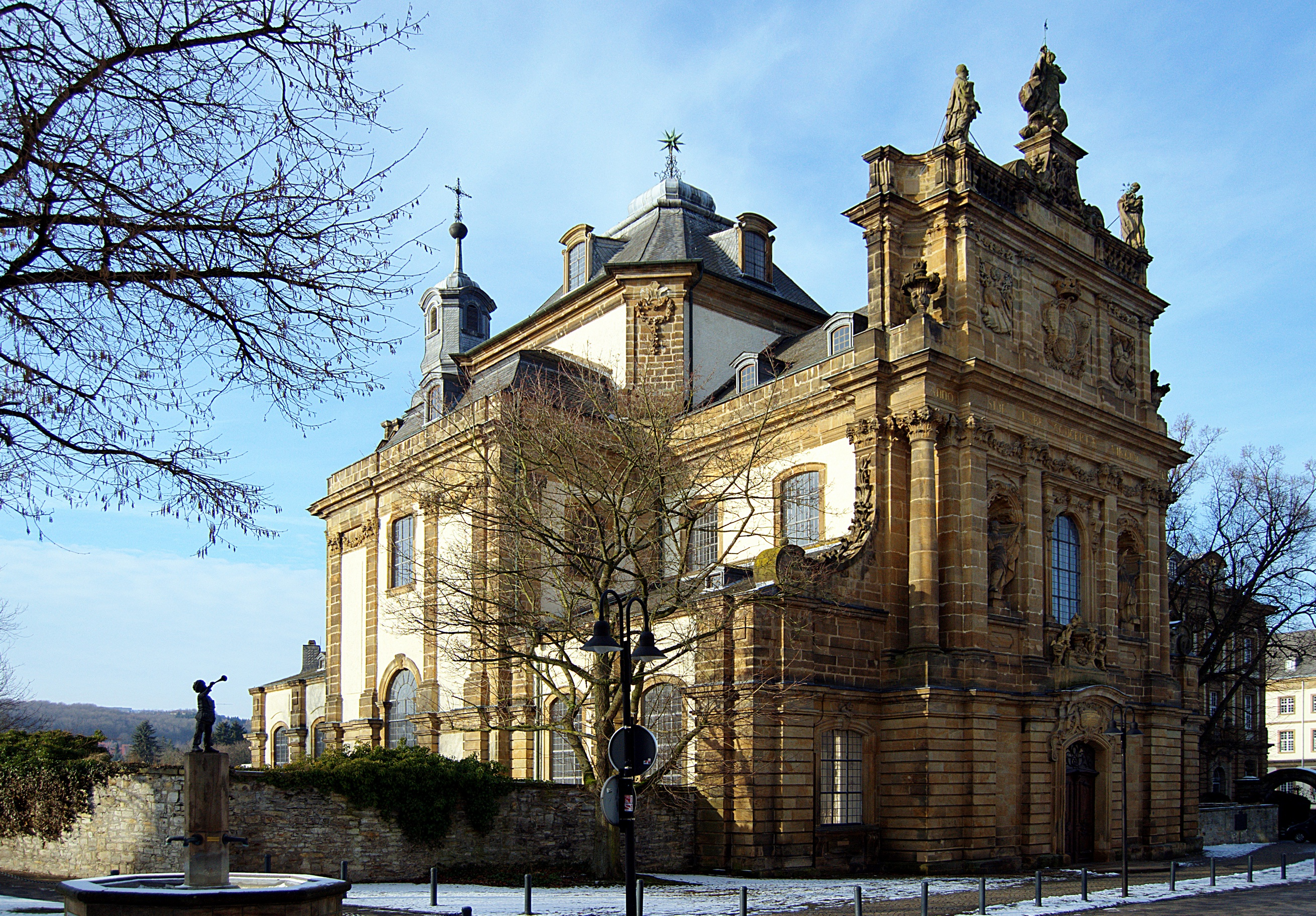 Ansicht der Kirche Maria Immaculata in Büren, Westfalen aus südlicher Richtung